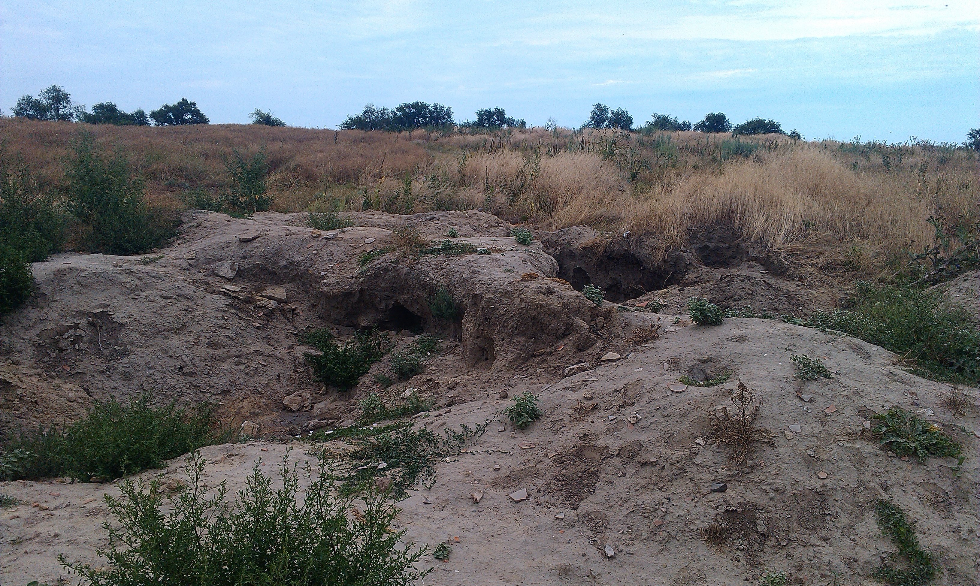 Фрагменти кераміки.